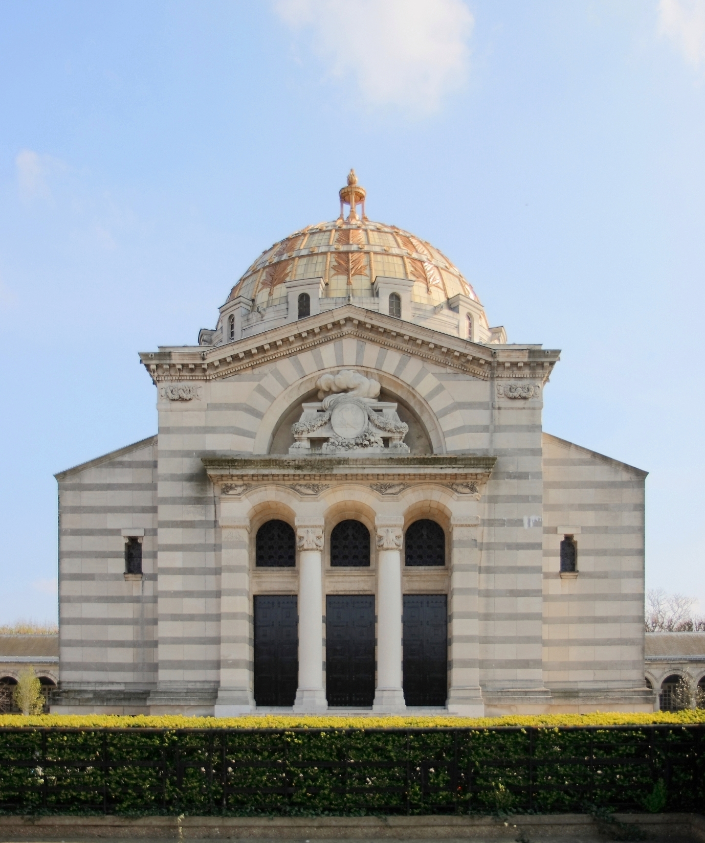 Crématorium du Père-Lachaise, architect: Jean Camille Formigé